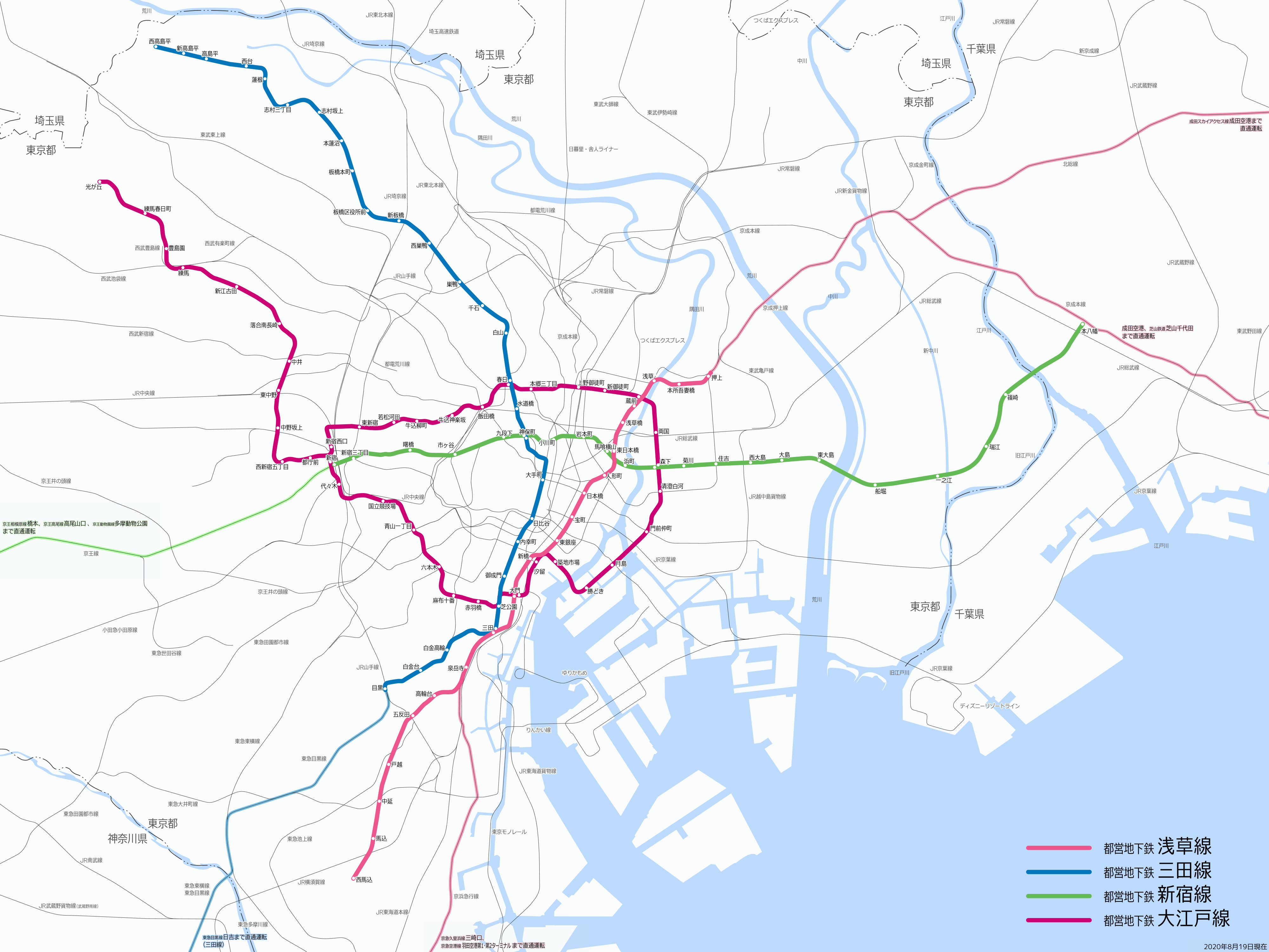 都営地下鉄の路線図（2020年8月19日現在）